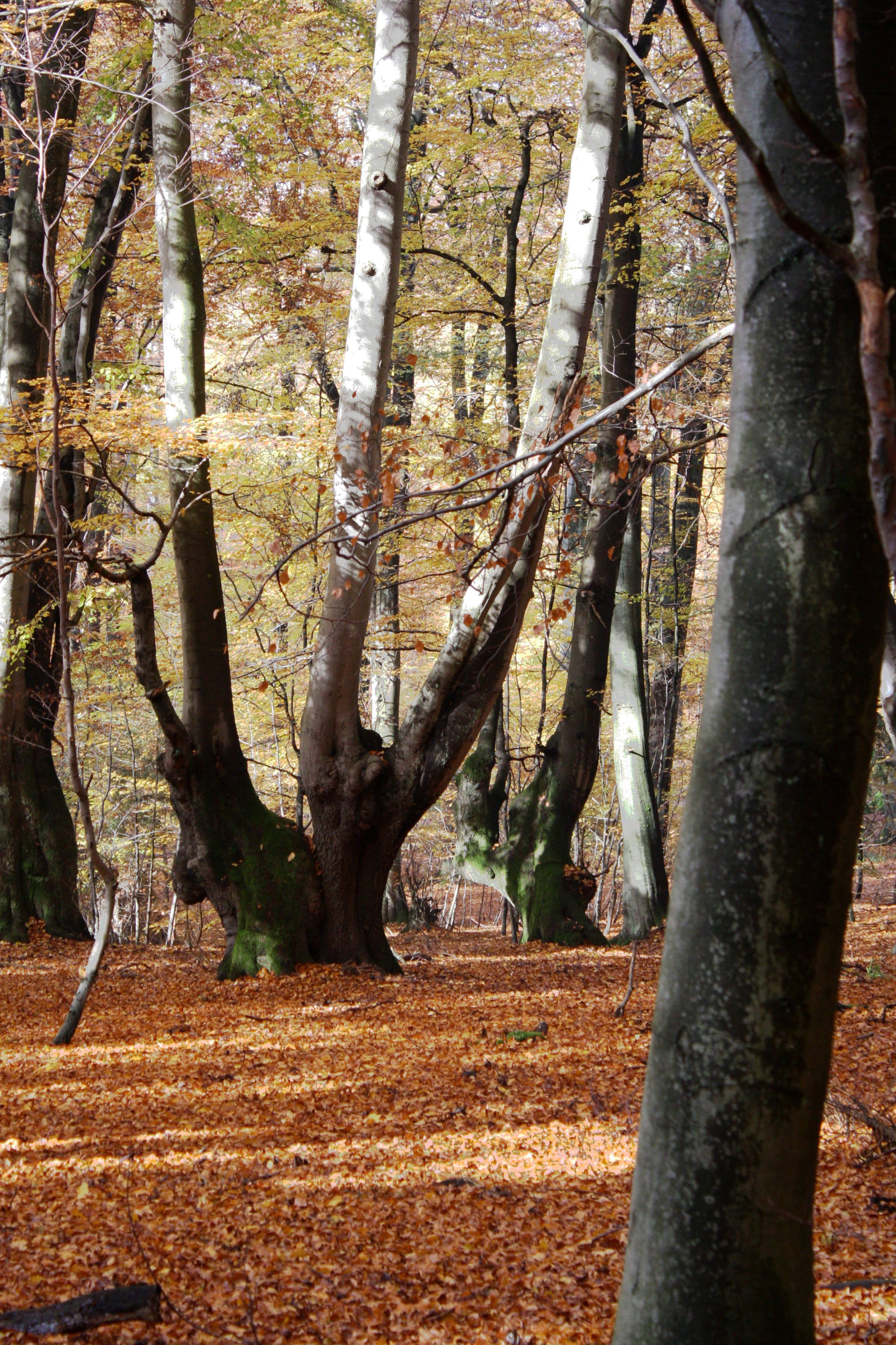 Vereinzelt haben Bäume überlebt, die Bestandteil der Wallhecke Rheingauer Gebück waren, wie hier in der Nähe der Mapper Schanze (bewachter Durchlass). Die Verletzungen der Bäume, die für die Verflechtung zum Gebück notwendig waren, haben zu typischen Wuchsformen geführt.